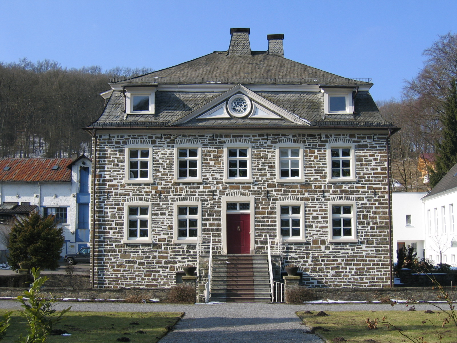 Bürogebäude in Hemer-Sundwig, Stephanopeler Straße 42. Errichtet 1796, Denkmal seit 2001. This image shows a heritage building in Germany, located in the North Rhine-Westphalian city Hemer (no. 77).